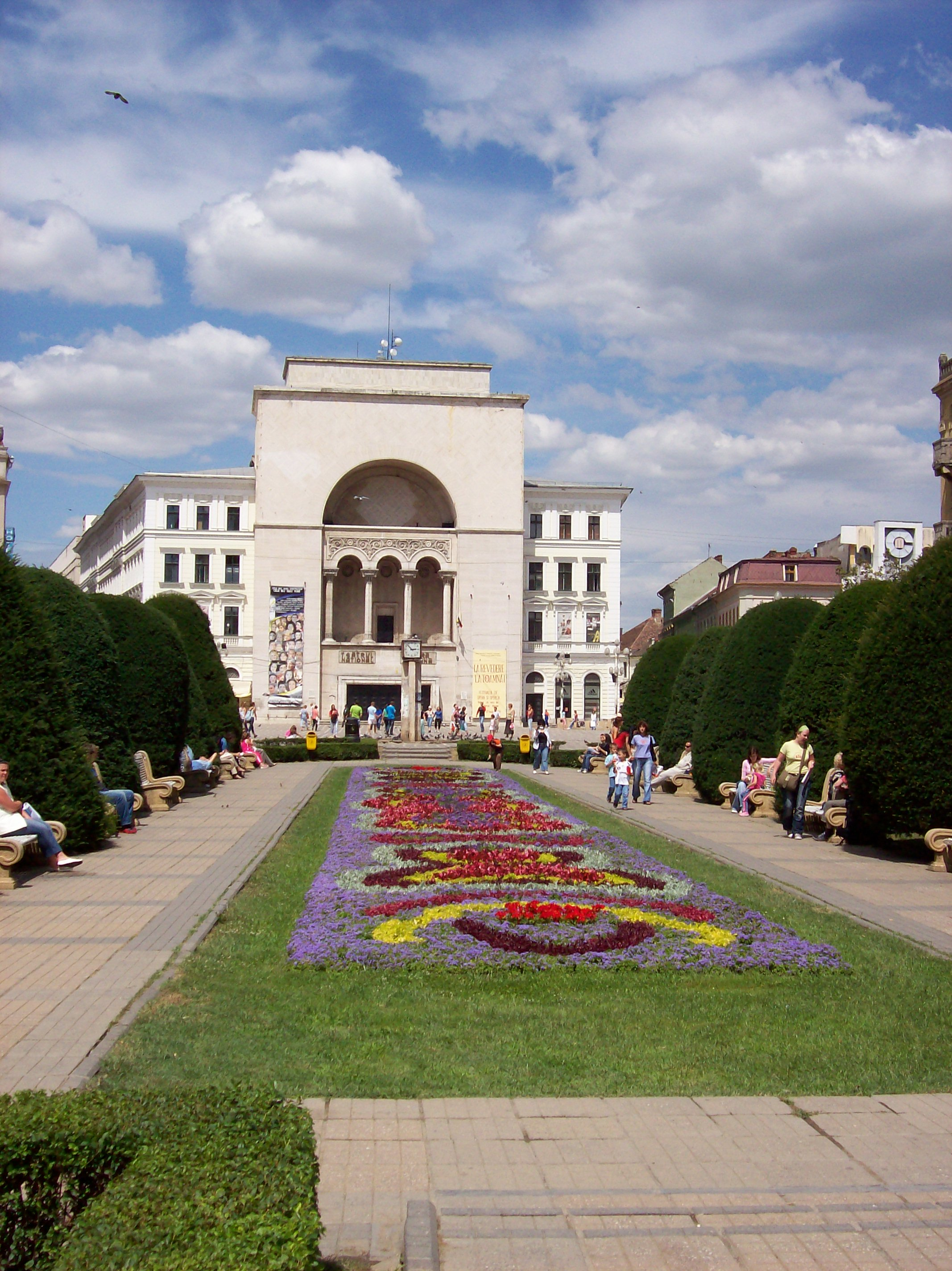 Timişoara, 2006